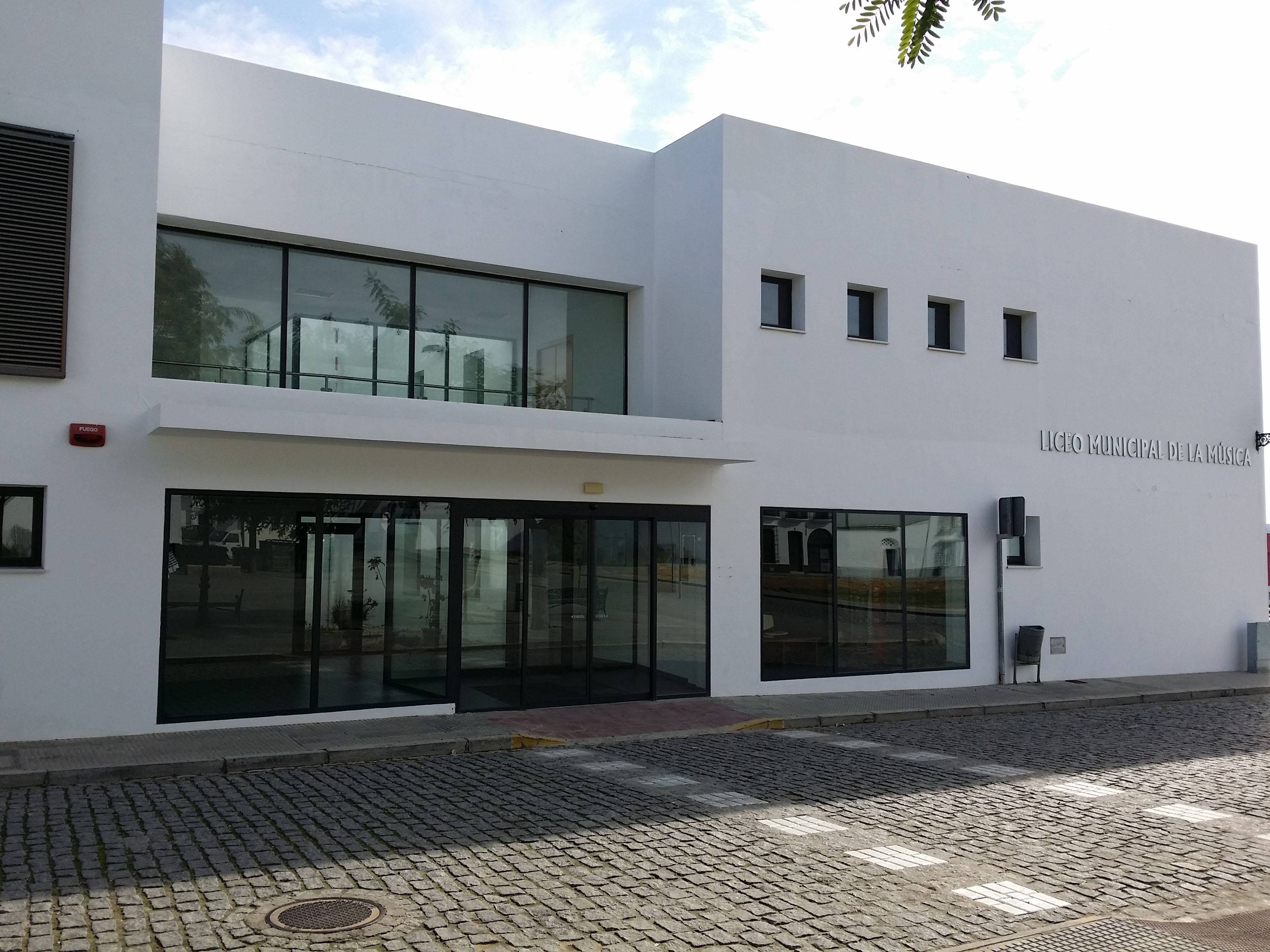 Liceo de la Música de Moguer